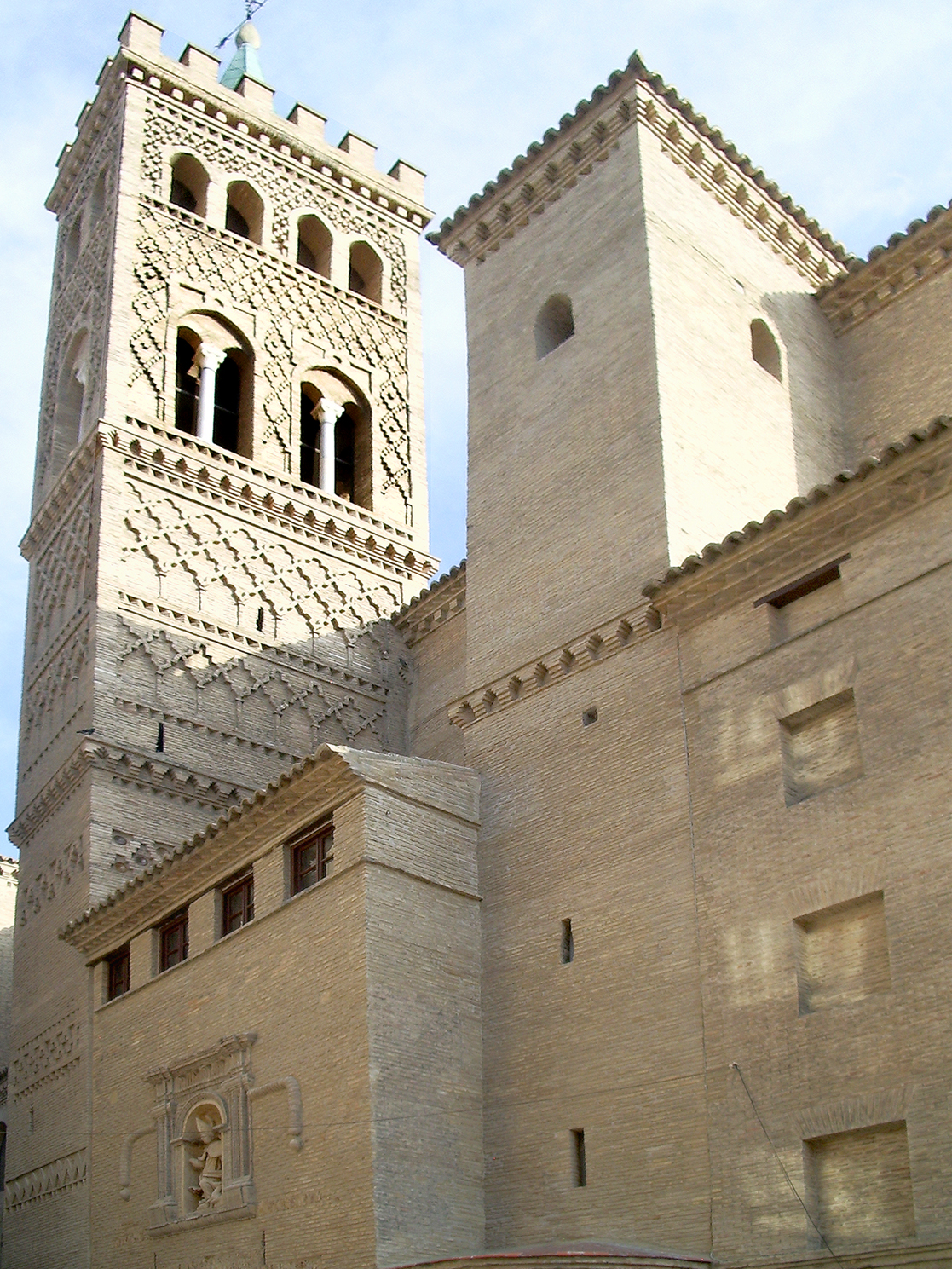 Iglesia de San Gil I (Zaragoza, España), mudéjar, siglo XIV.